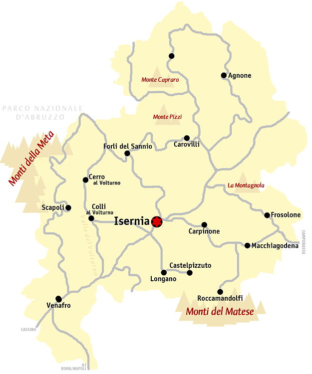 Kaart provincie Isernia